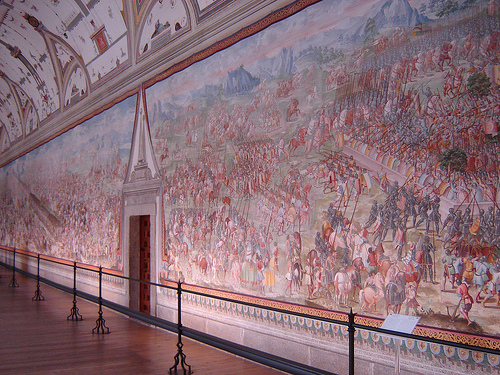 Vista general de la Galeria de Batallas